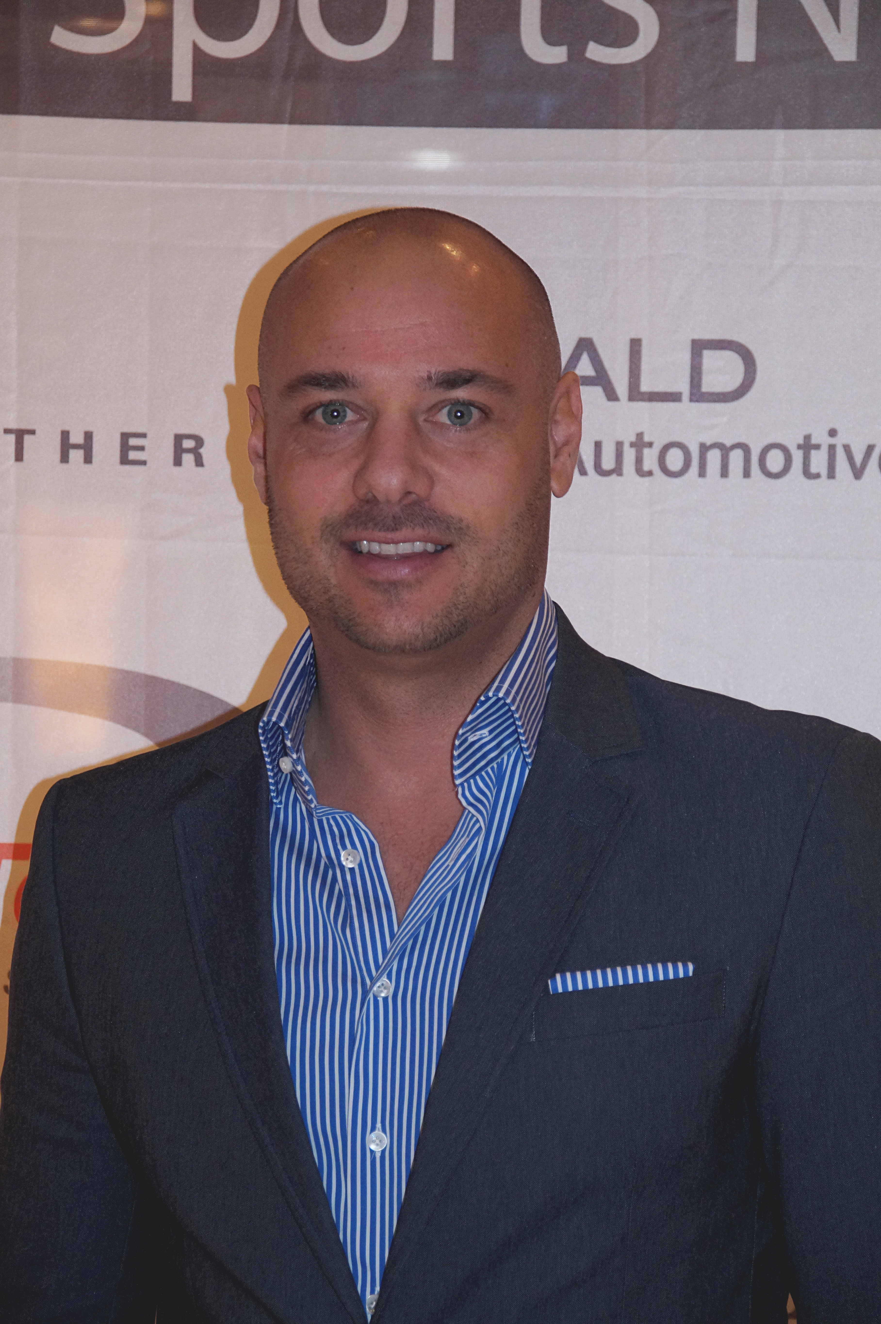 Christian Tews bei der "Kölner Charity Sports Night", am 27.11.2016 im Kölner Dorint Hotel.